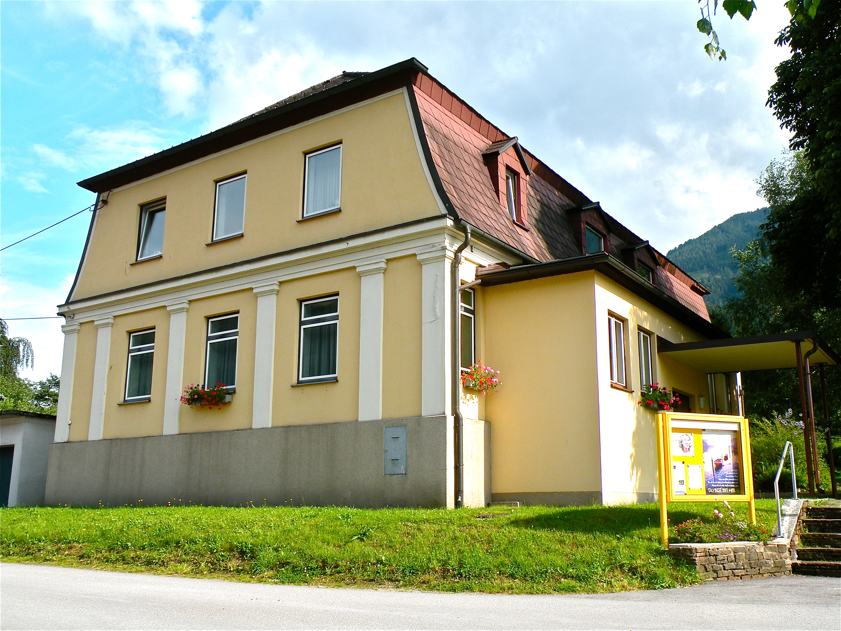 Evangelisches Gemeindehaus unmittelbar neben der evangelischen Auferstehungskirche in der Stadt Rottenmann im Bezirk Liezen in der Steiermark